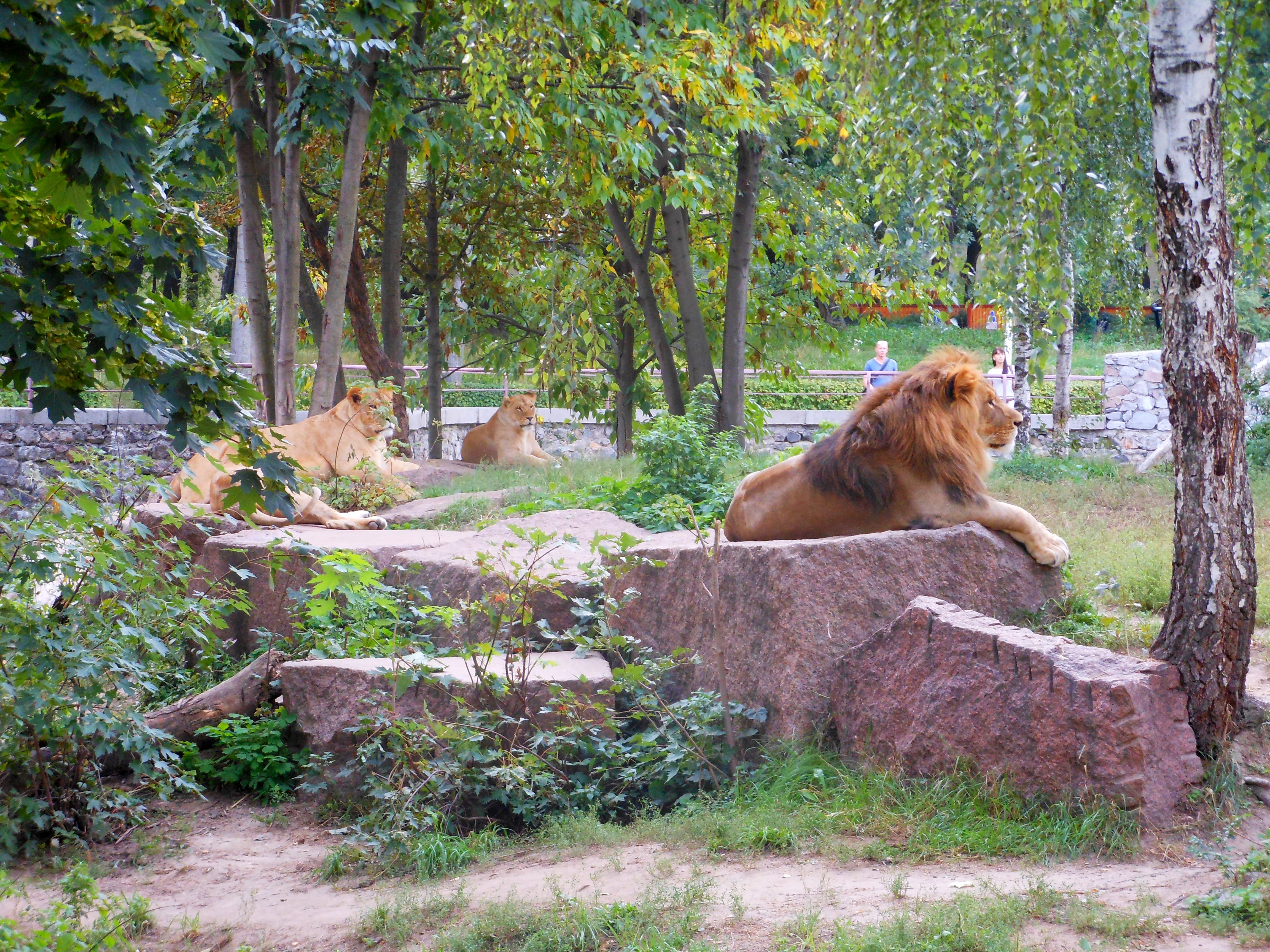 Київський зоопарк, Шевченківський район